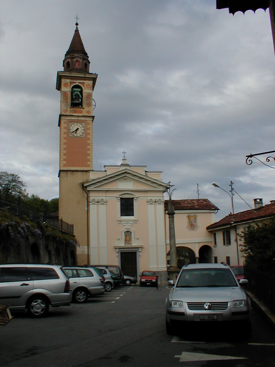 Chiesa parrocchiale di San Rocco a Bedigliora